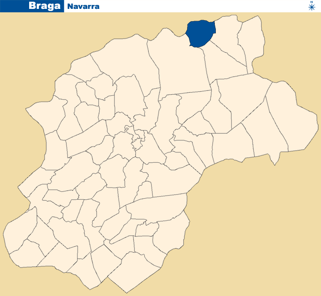 Localização de Navarra no concelho de Braga.